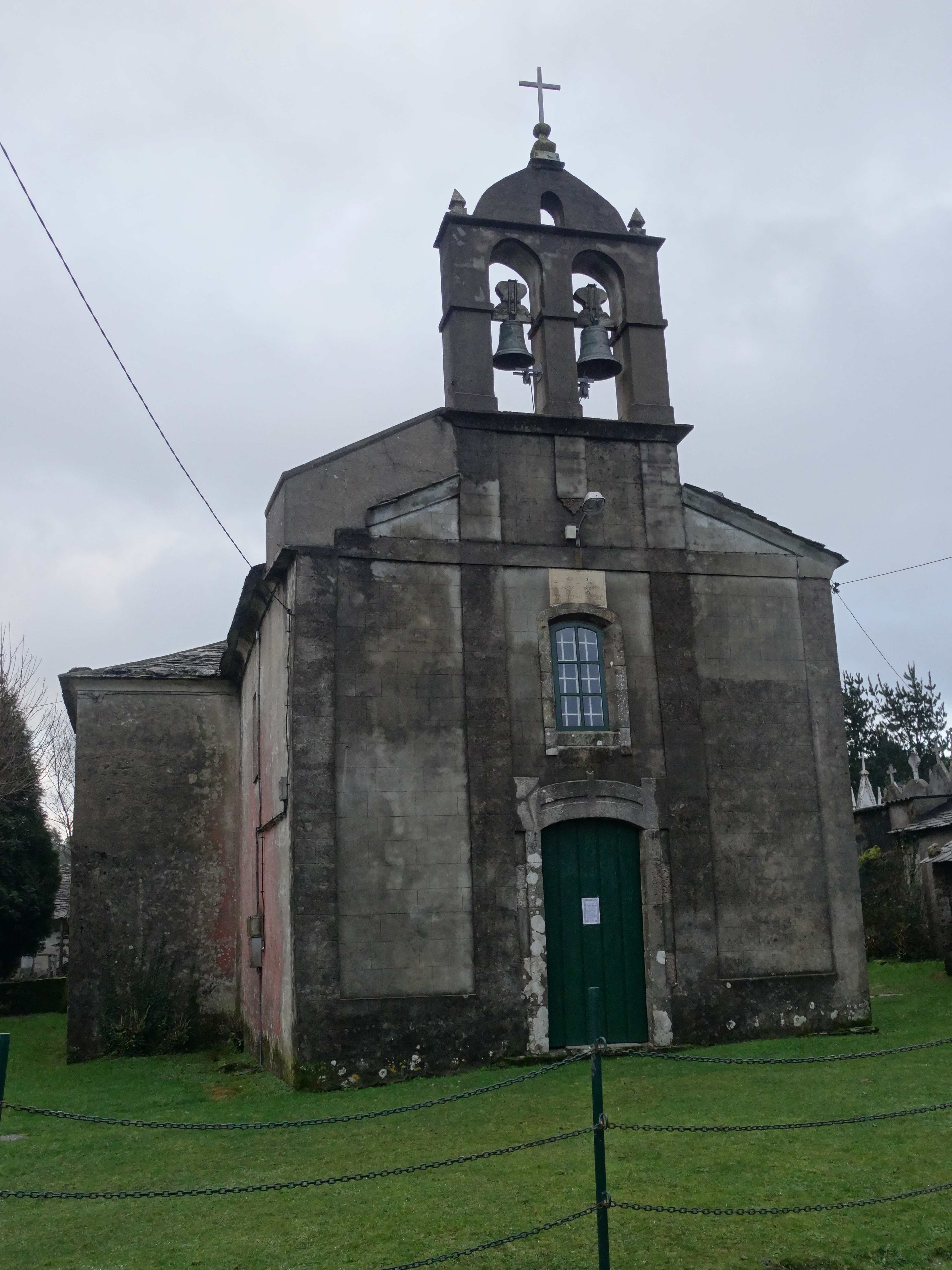 Ver título.